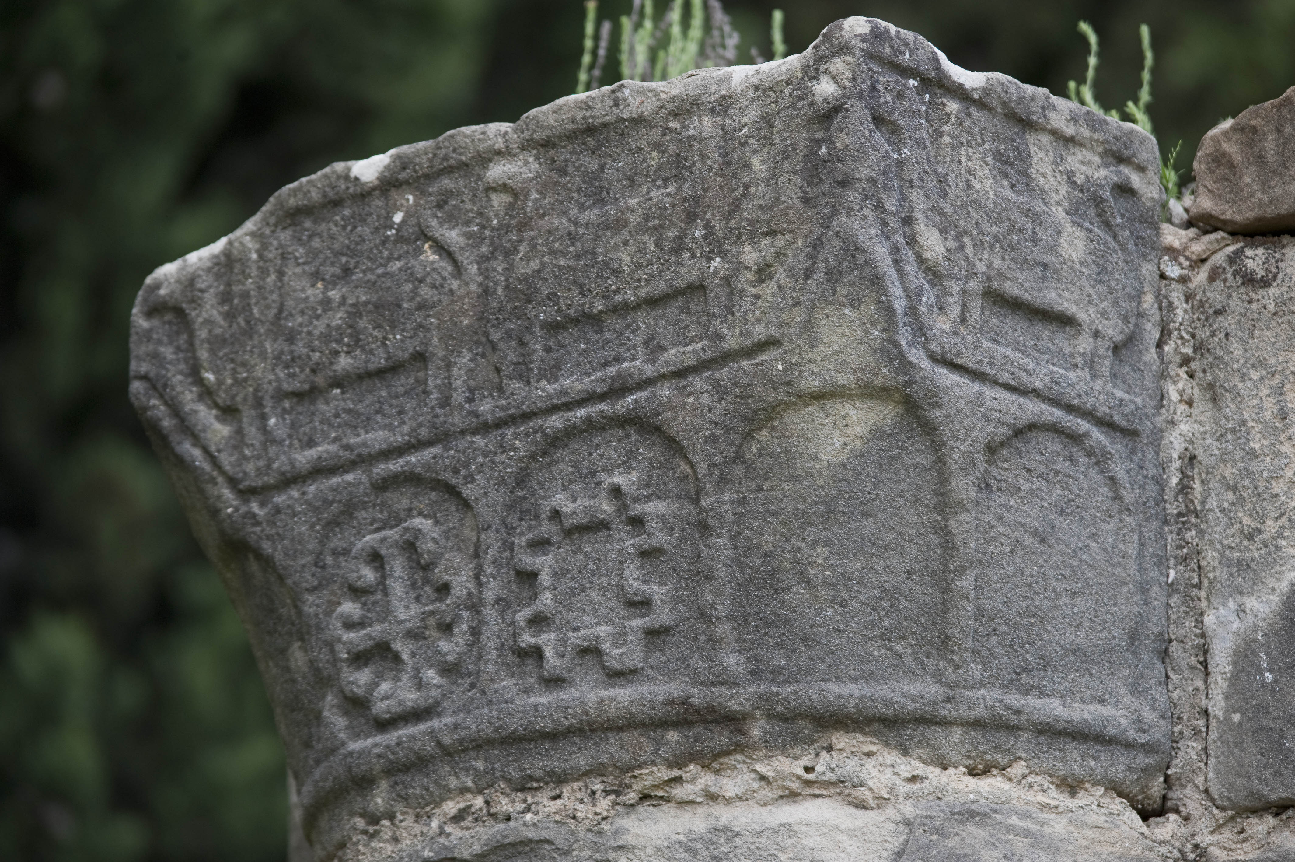 Capitello del battistero della pieve di Sant'Appiano, Barberino Val d'Elsa